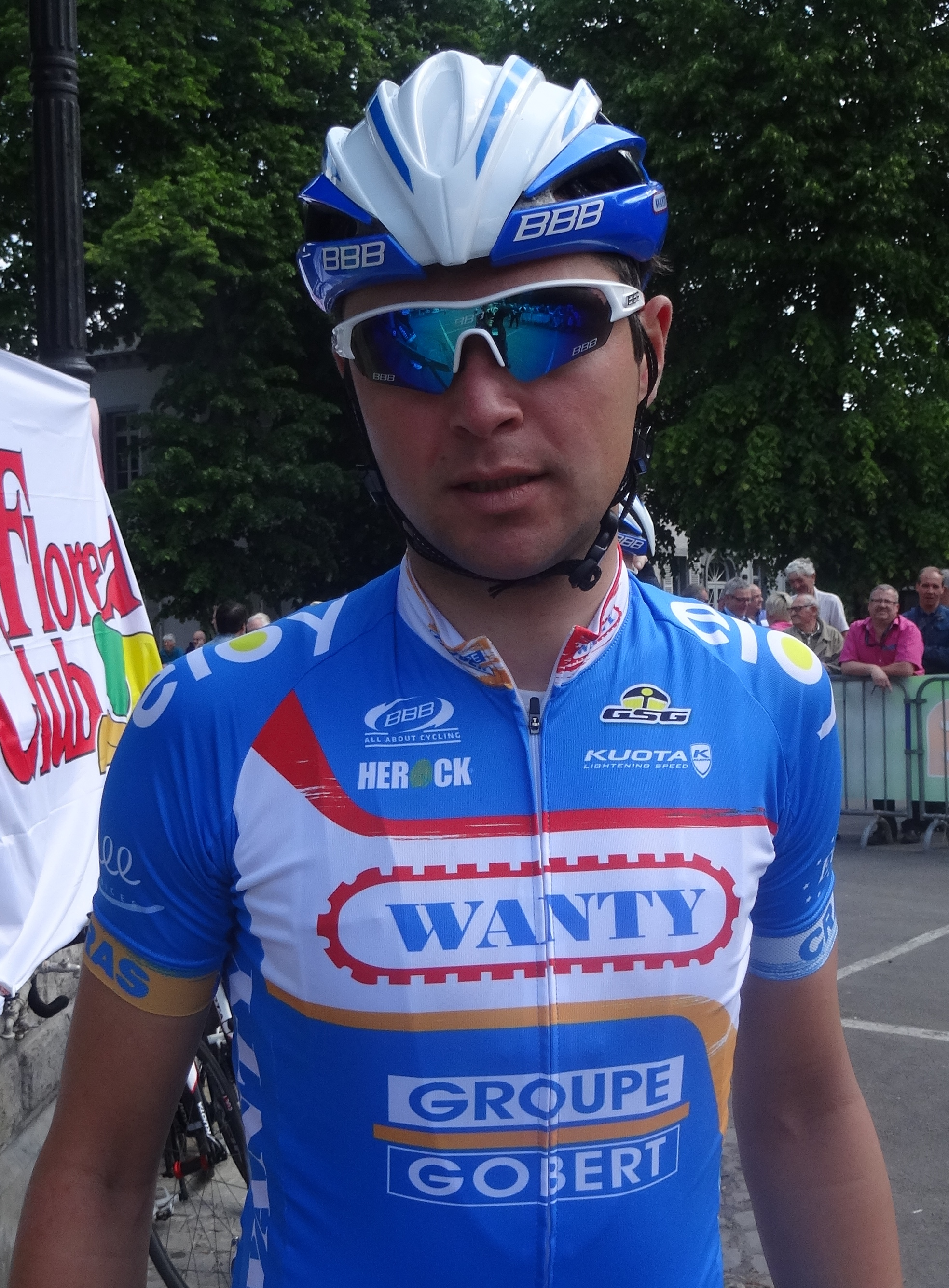 Reportage réalisé le samedi 17 mai à l'occasion du départ du Grand Prix Criquielion 2014 à Boussu, Belgique.